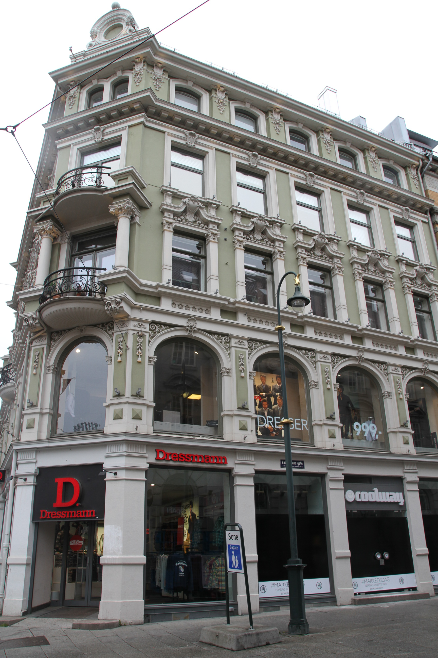 Bygård med fasade mot Stortorvet og Karl Johans gate, Oslo